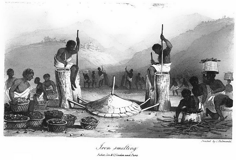 iron smelting in madagascar